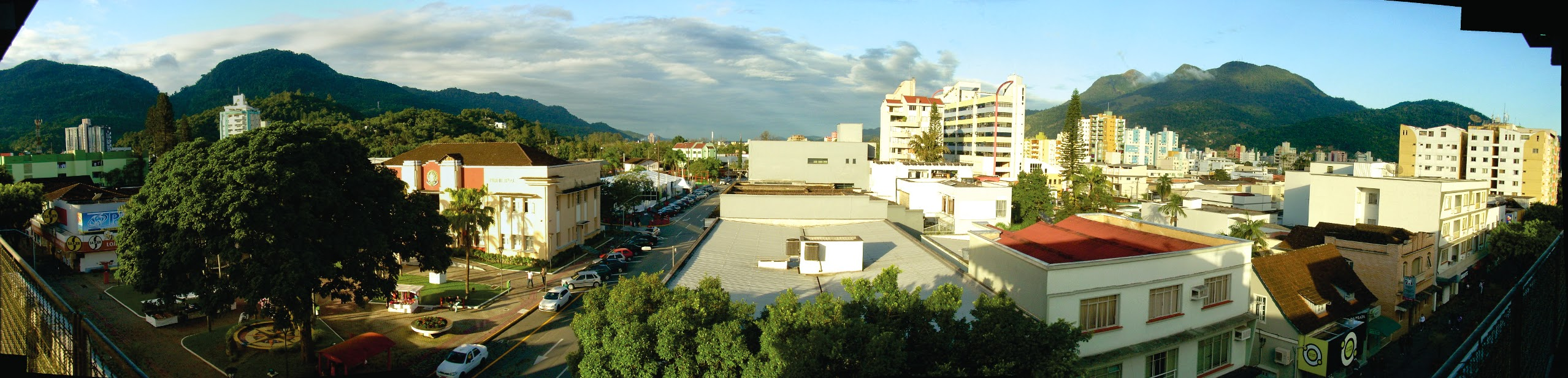 Vista panorâmica do centro do município de Jaraguá do Sul.